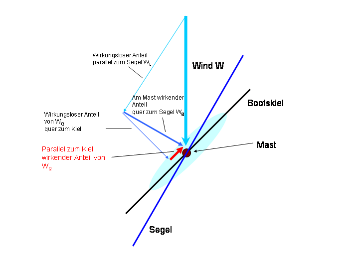 Kräfte-Diagramm des Kreuzens in der Seefahrt Quelle: Eigene Zeichnung Autor: S. Roy (benutzer:bapon, eigene Zeichnung)